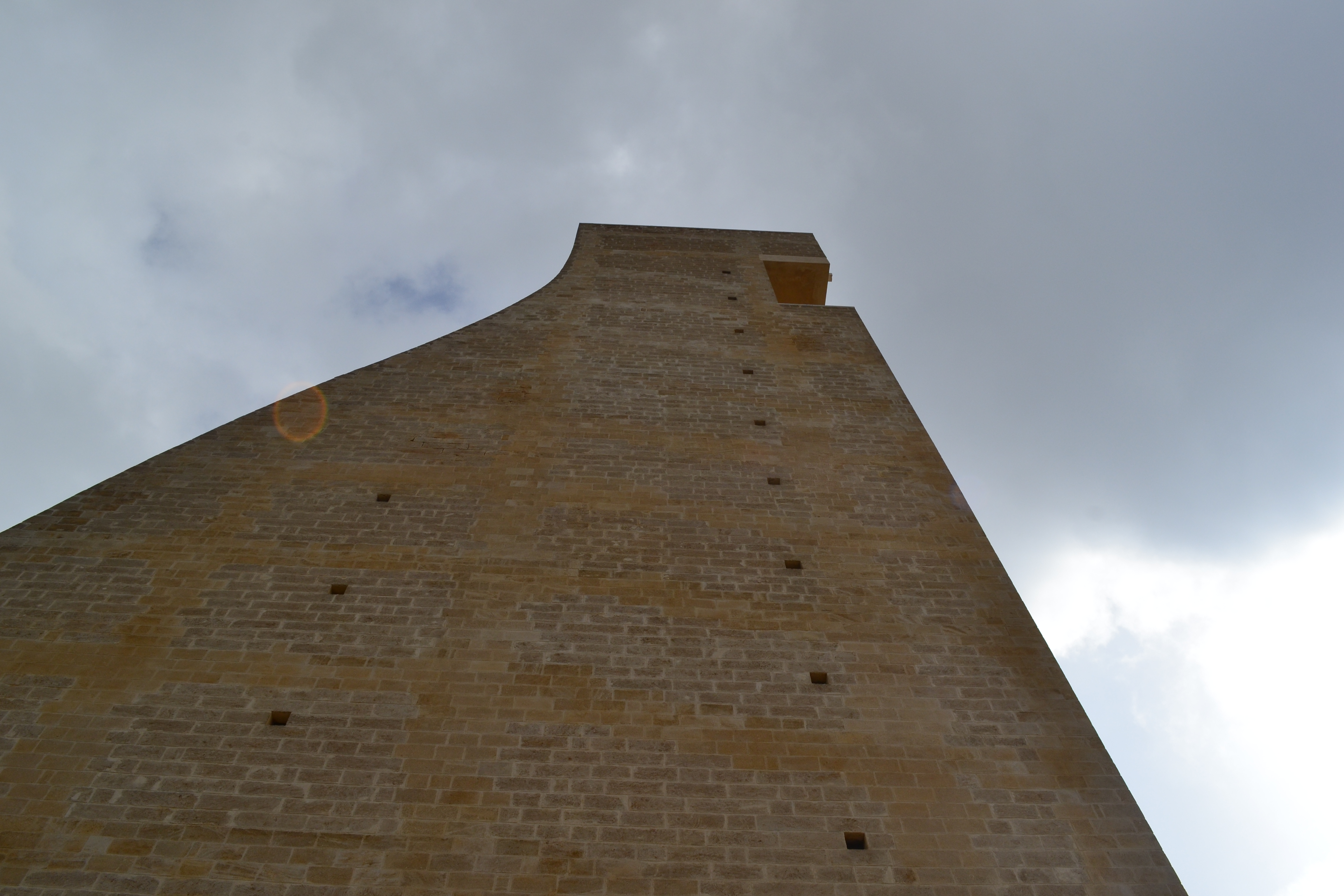 porto di brindisi This is a photo of a monument which is part of cultural heritage of Italy. The authorisation for taking photos of this object was provided by the World Wide Fund for Nature Italy.